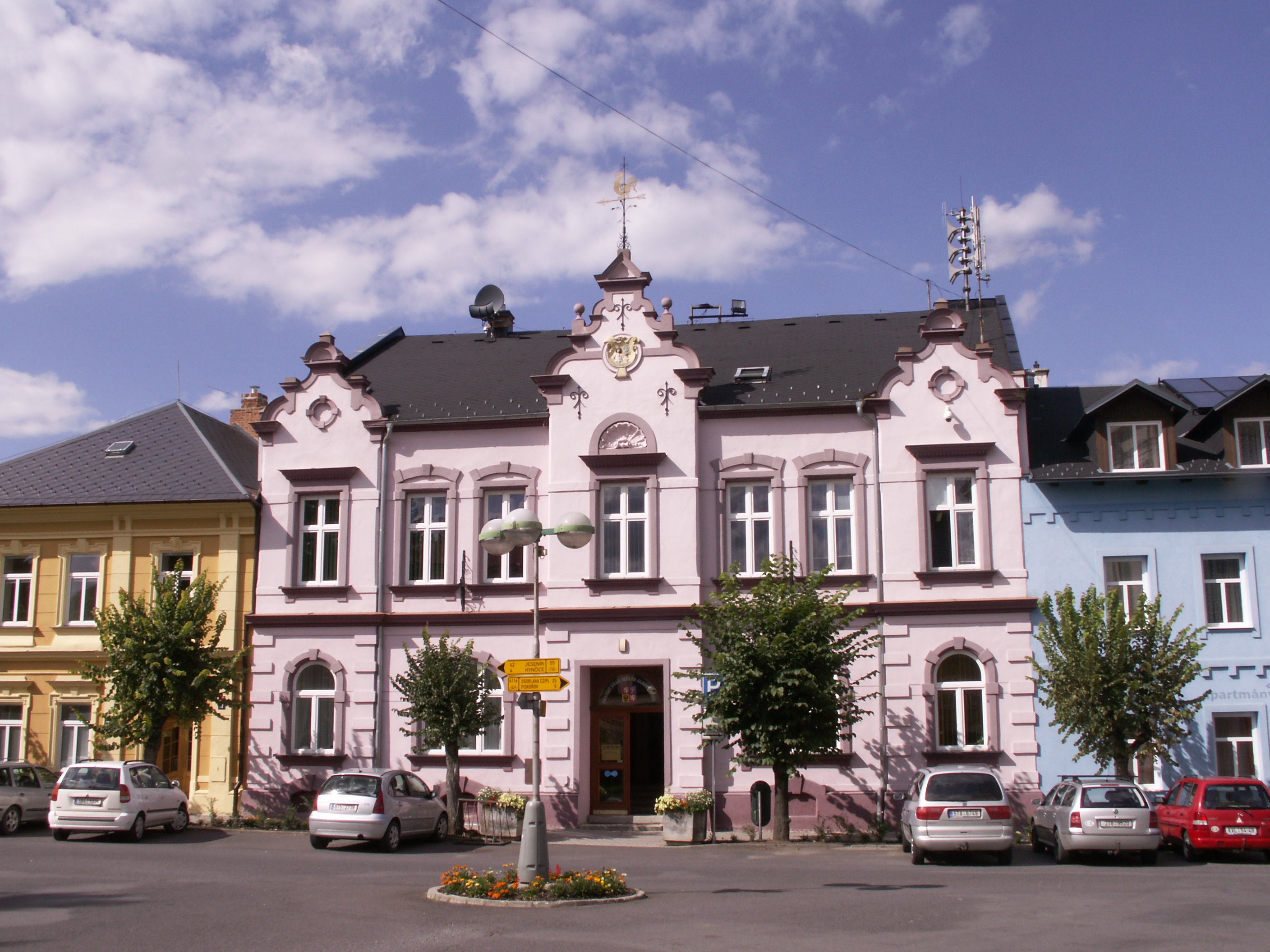 Město Albrechtice, okres Bruntál, budova městského úřadu, náměstí ČSA